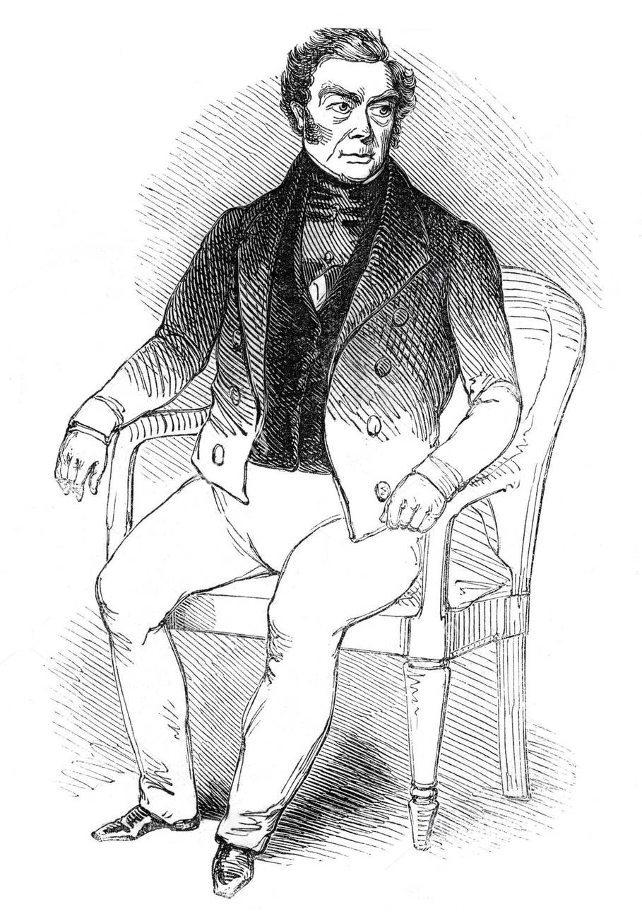 Gravure représentant Vidocq, publiée dans un article consacré à un séjour du détective dans la capitale britannique. The Illustrated London News, 29 mars 1845.